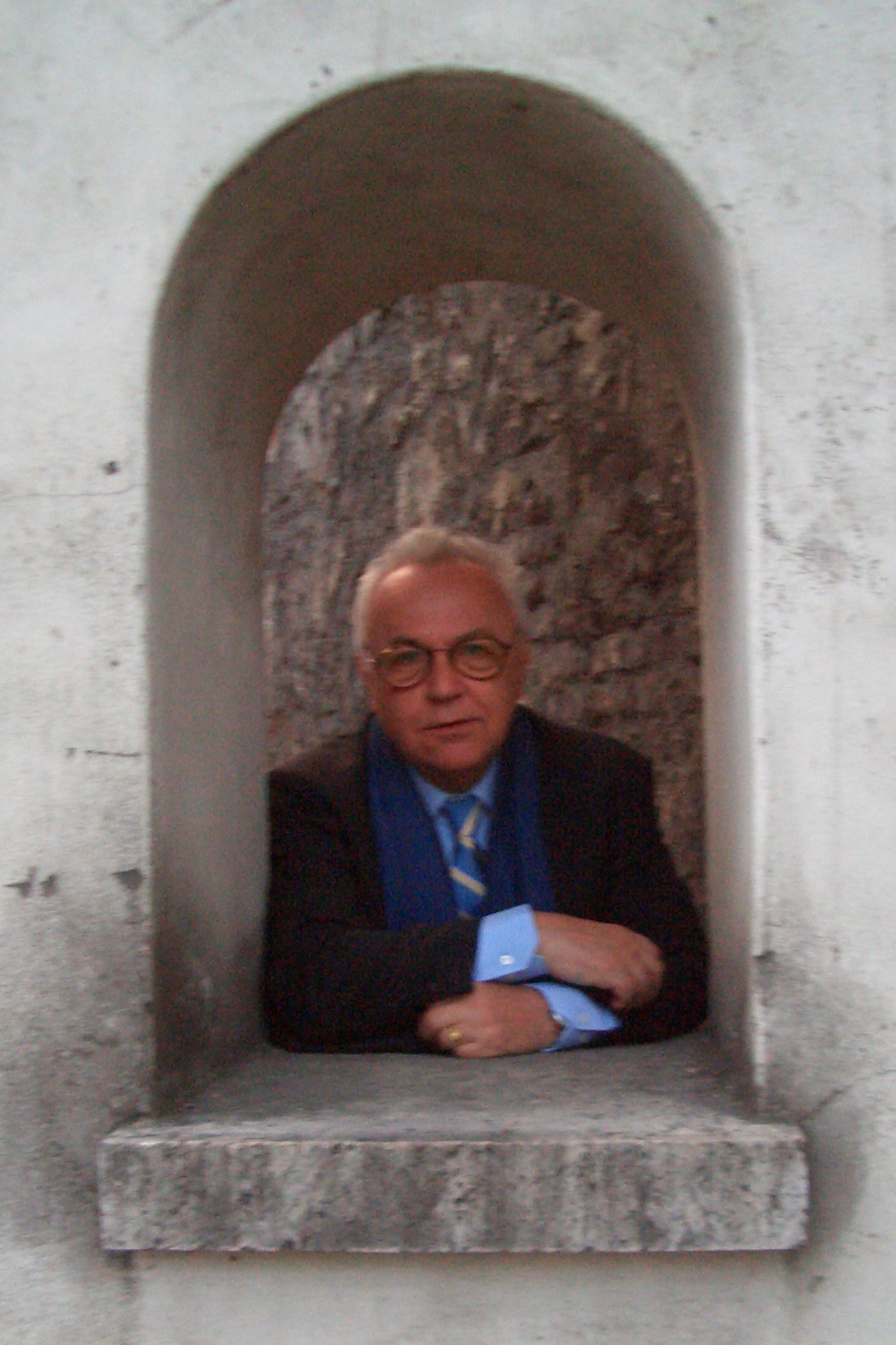 Dieter Prokop Autorenfoto